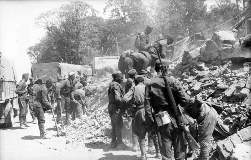 Scherl: An der Sowjetfront. Sowjetgefangene beseitigen den Schutt zerstörter Häuser, um die Durchfahrt für die deutschen Kolonnen freizumachen. (Minsk) PK-Aufnahme: Kriegsberichter: Wiesemann (Sch) 7071-41 "Fr." "Fr.OKW" Juli 41 Information added by Wikimedia users.Беларуская (тарашкевіца): На савецкім фронце. Савецкія ваеннапалонныя прыбіраюць з дарогі рэшткі разбураных дамоў, каб вызваліць шлях для праезду нямецкіх калёнаў. Ззаду відаць Цэнтральны сквэр (цяпер — Панікоўка). Менск, Беларусь. Ліпень 1941 году.